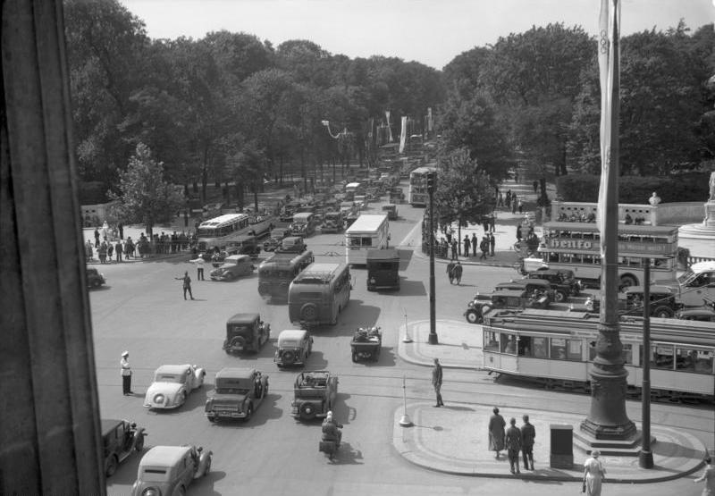 Berlin; Oympiade 1936 Platz vor dem Brandenburger Tor [Charlottenburger Chaussee]